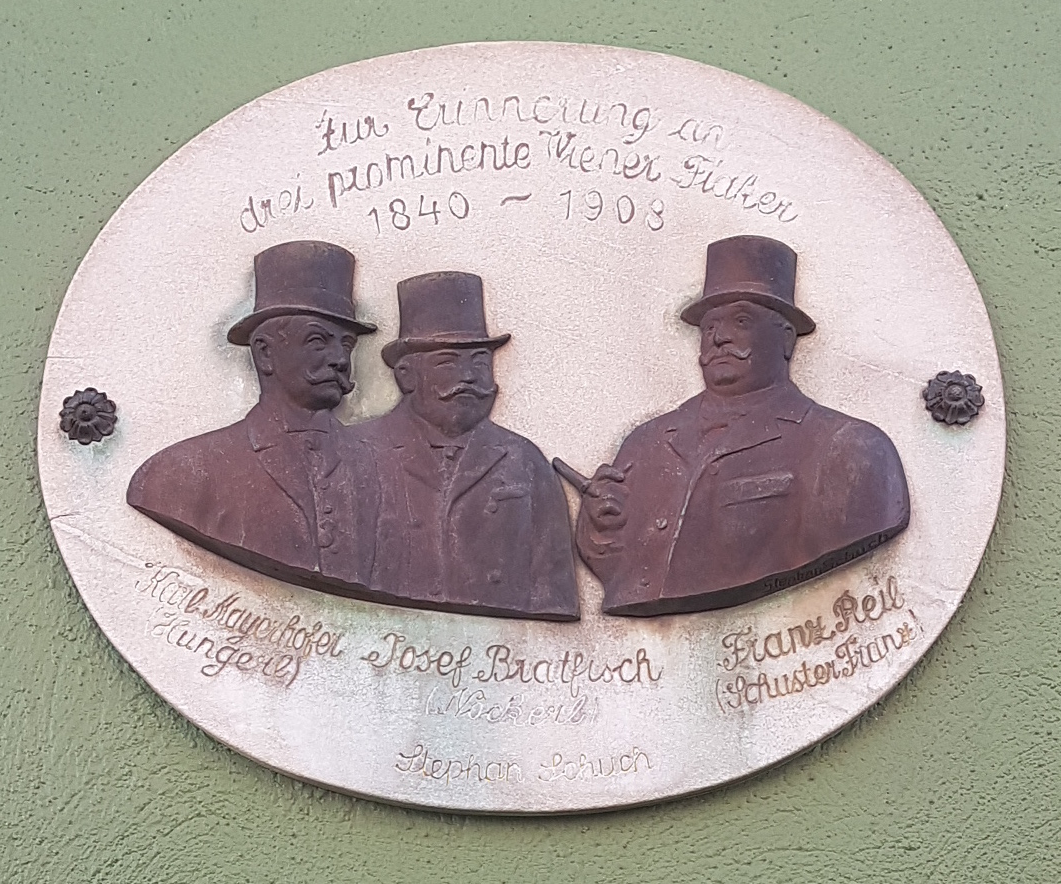 Gedenktafel in der Lacknergasse 60, 1170 Wien